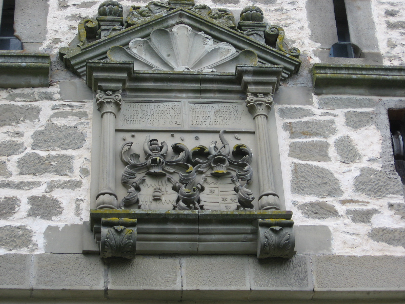 Schloss Obersontheim, Stiftertafel am Torturm, daneben Rolle der ehemaligen Zugbrücke